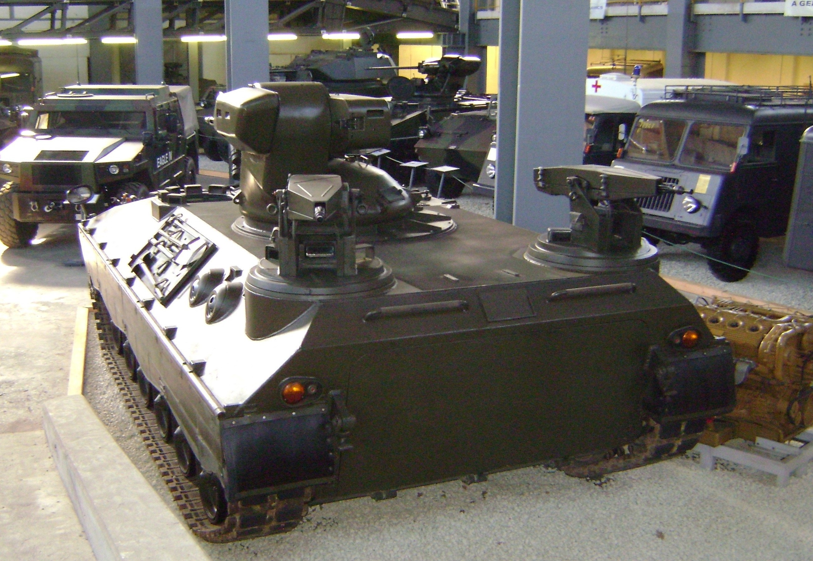 MOWAG Tornado Heck